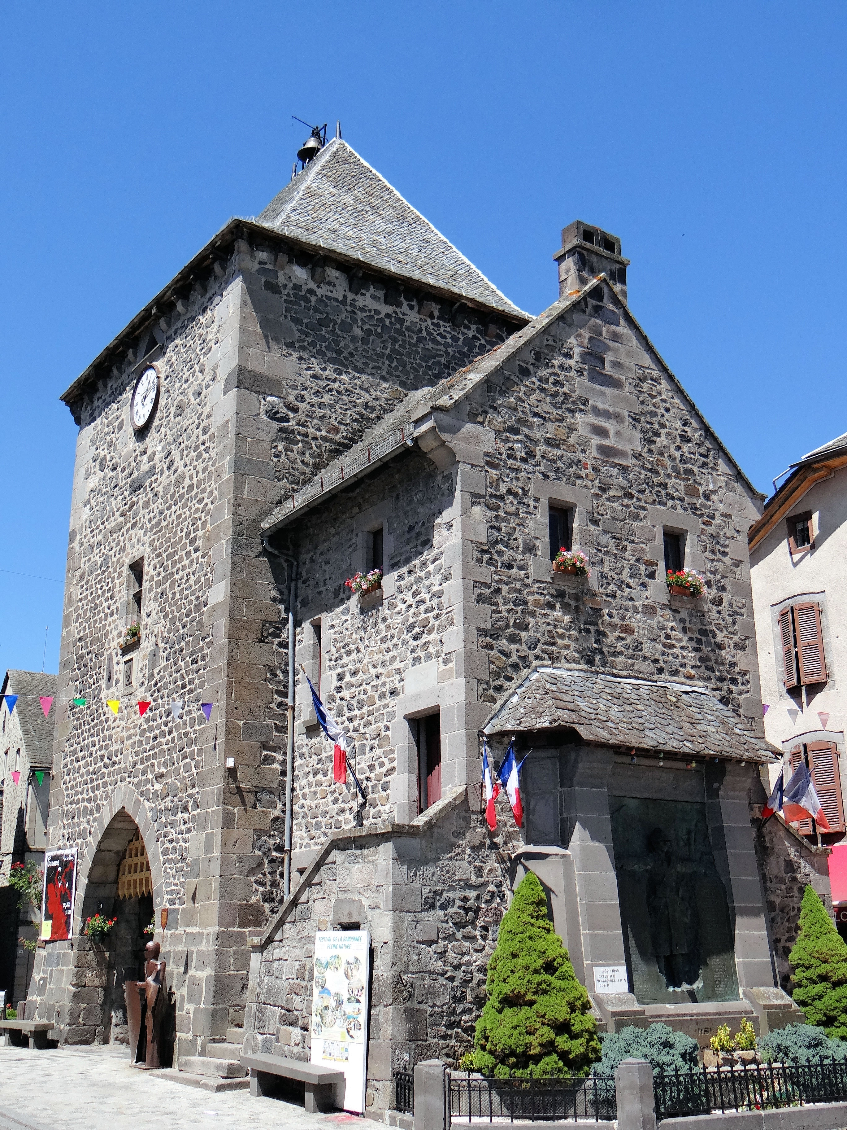 Mur-de-Barrez - Tour de Monaco avec le monument aux morts .